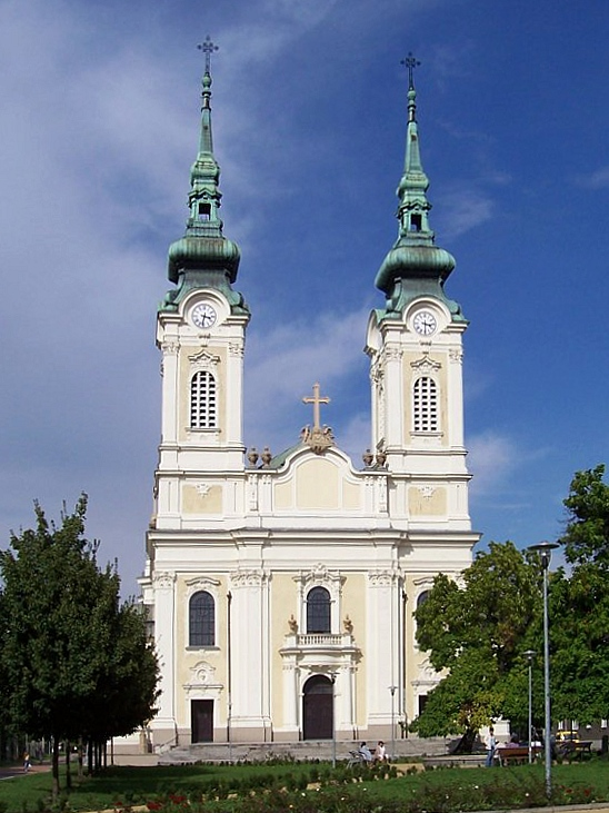 Chrám Panny Marie Královny v Mariánských Horách.